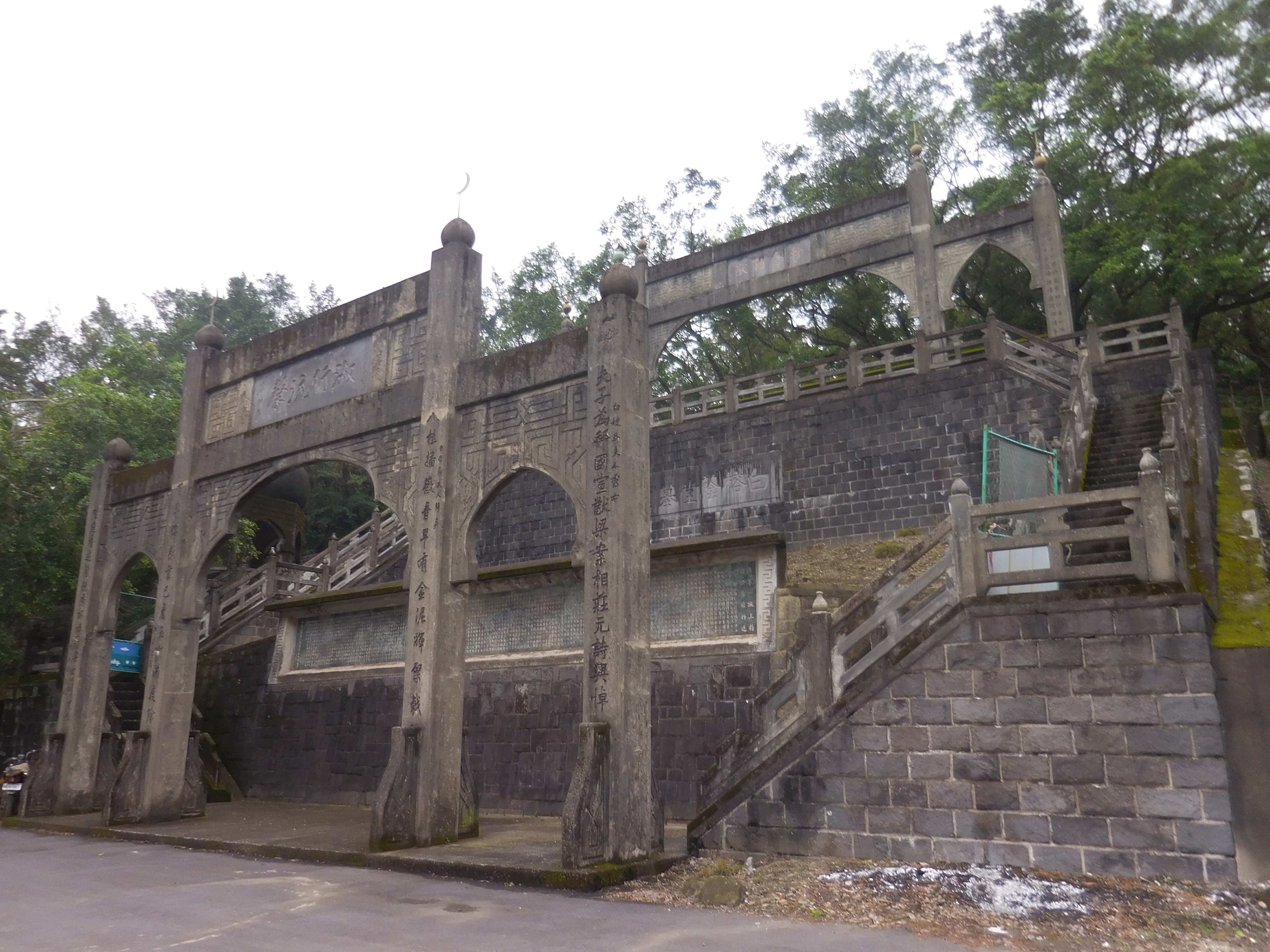 中文（台灣）: 白榕蔭堂墓園（白崇禧將軍墓）整修中